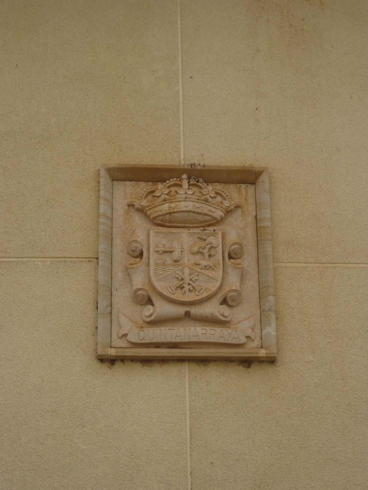 Escudo de Quintanarraya en la pared de la casa-villa.